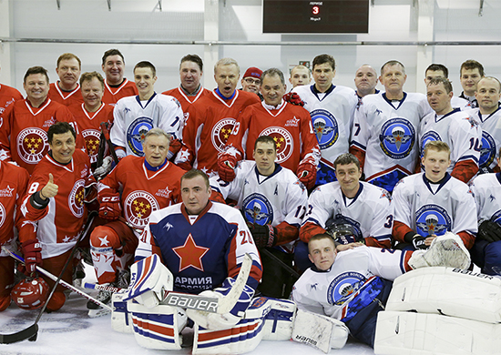 Участники товарищеского хоккейного матча между командами «ВДВ» и «Легенды хоккея СССР». Рязань, ледовый дворец спорта «Десант»